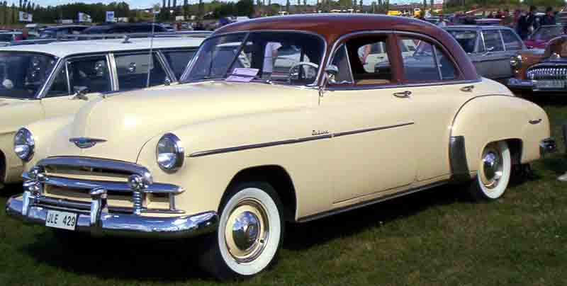 1950 Chevrolet Deluxe Series 2100HK, Styleline Sub-Series, Model 2103 4-Door Sedan